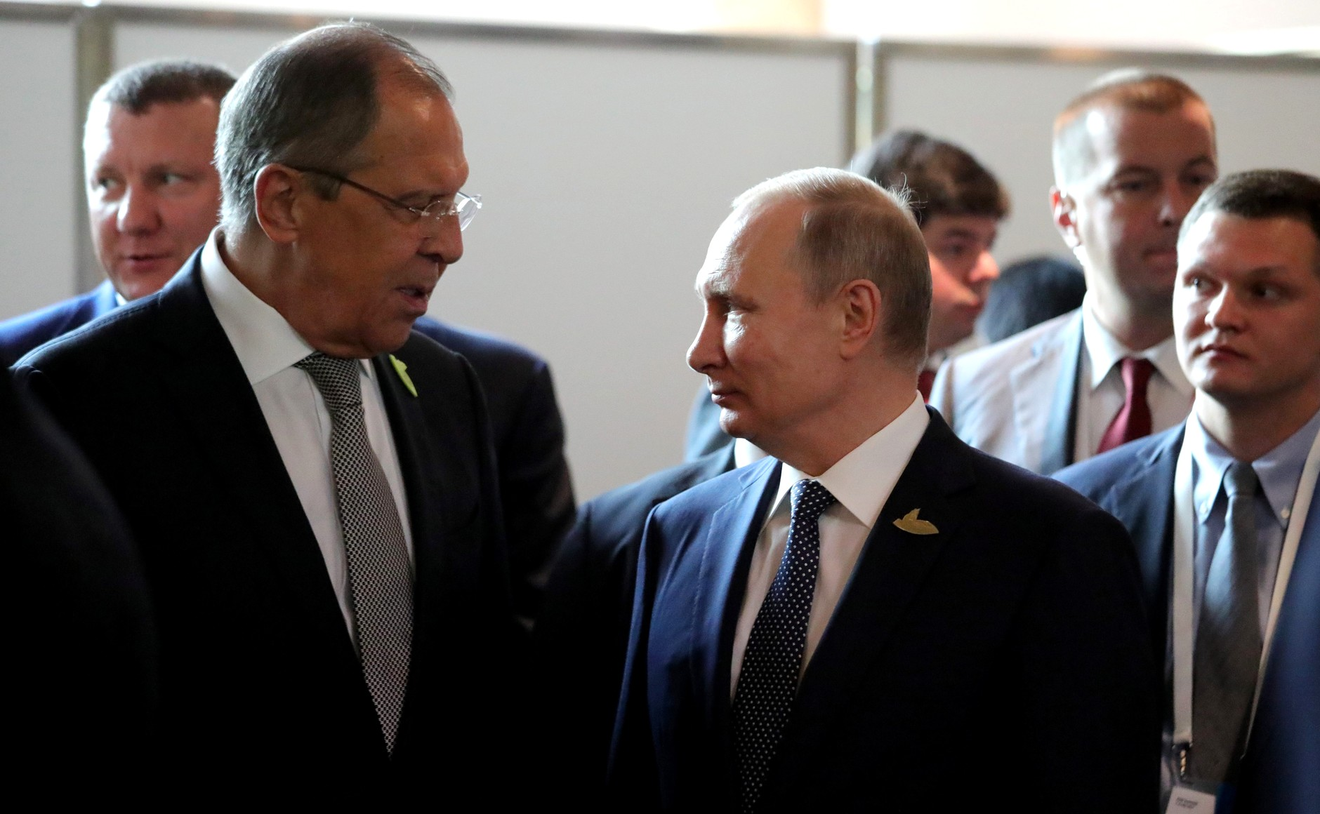 Перед началом саммита «Группы двадцати». Президент России Владимир Путин с Министром иностранных дел России Сергеем Лавровым